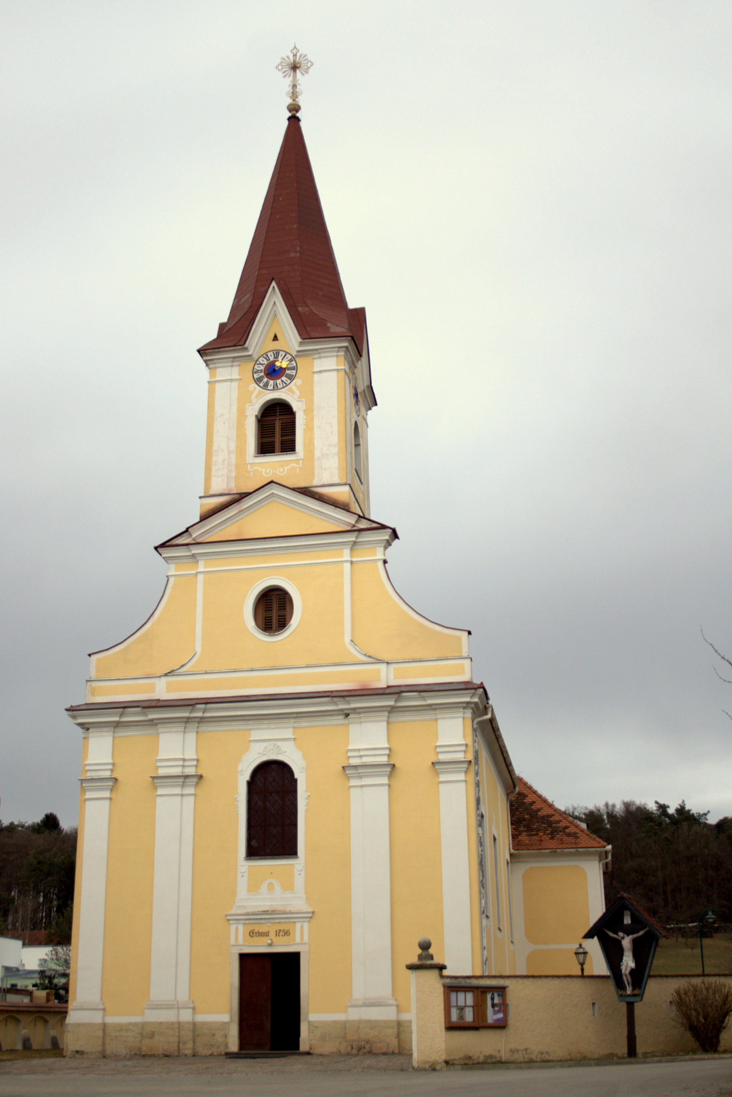 Ebersdorf Kath. Pfarrkirche hl. Andreas